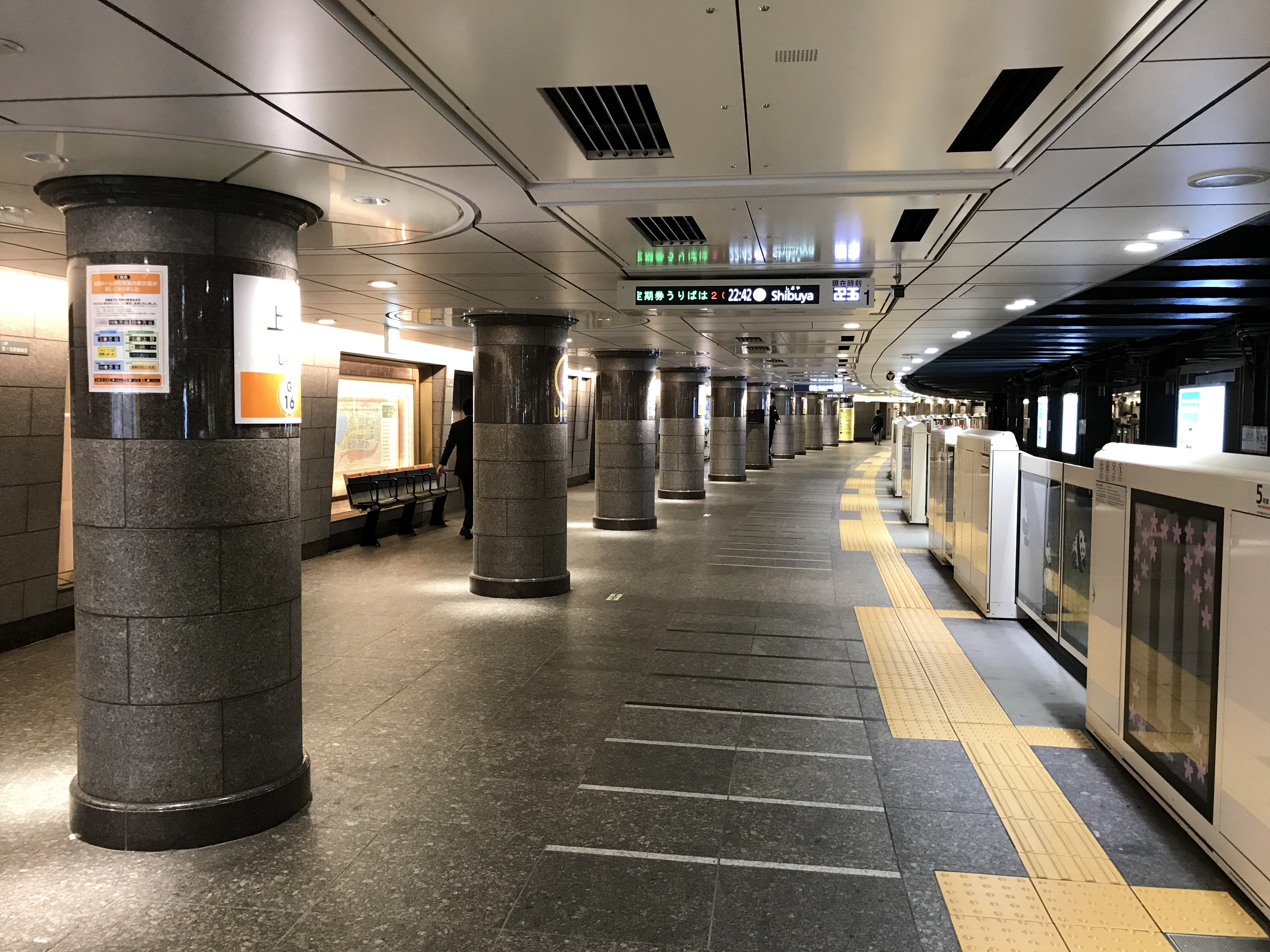 東京メトロ銀座線上野駅1番線ホーム（リニューアル後）